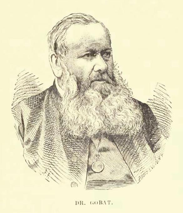 Samuel Gobat (1799-1879), war protestantischer Bischof von Jerusalem